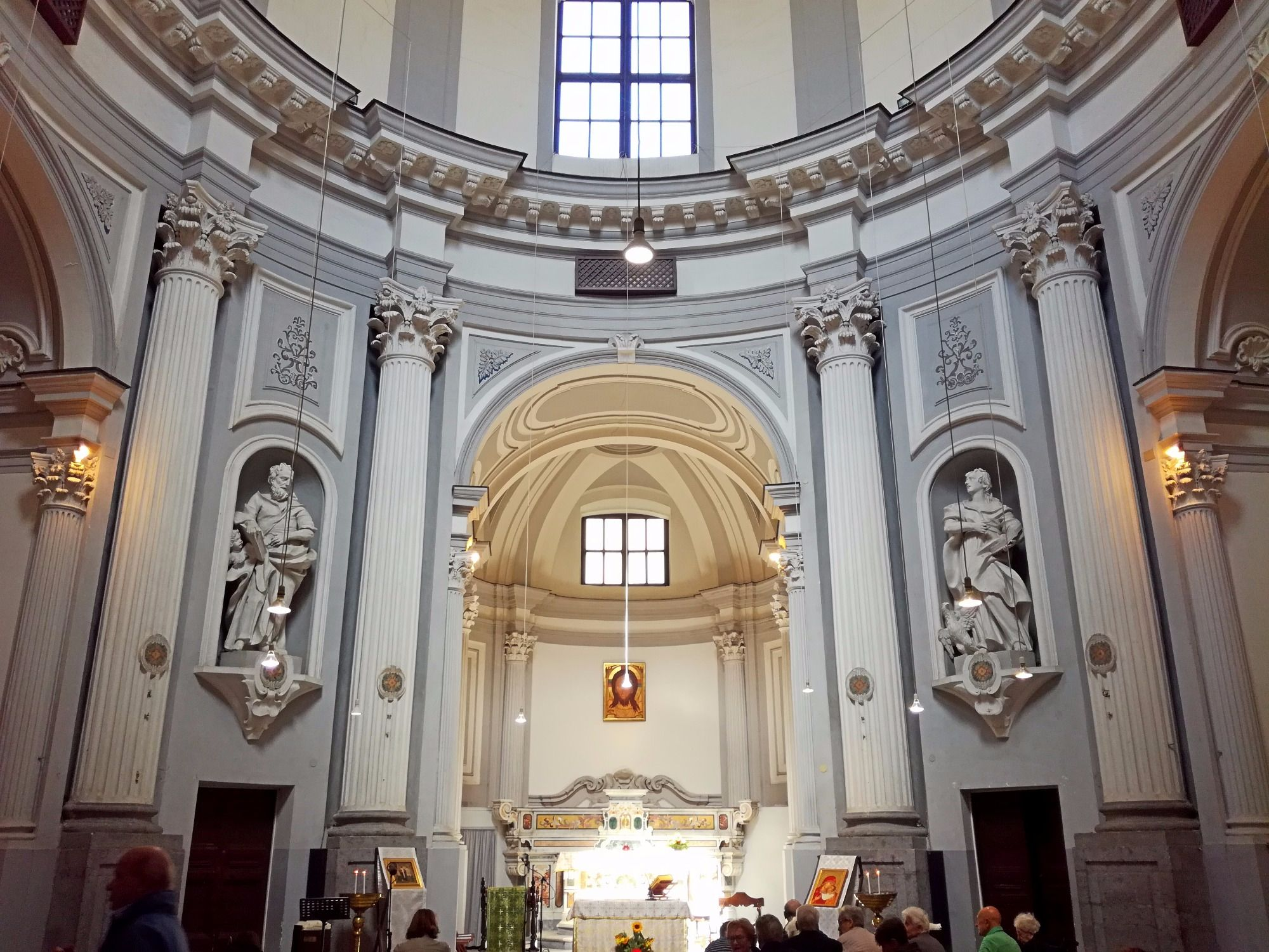 Interno Nicola a Nilo